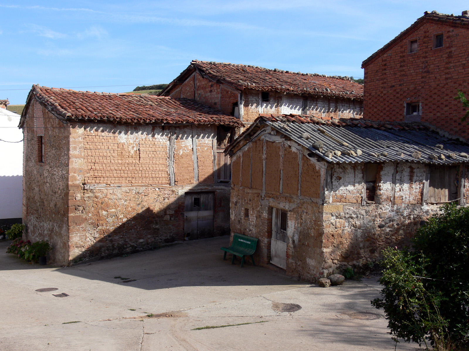 Gallinero de Rioja, aldea de Manzanares de Rioja (España)